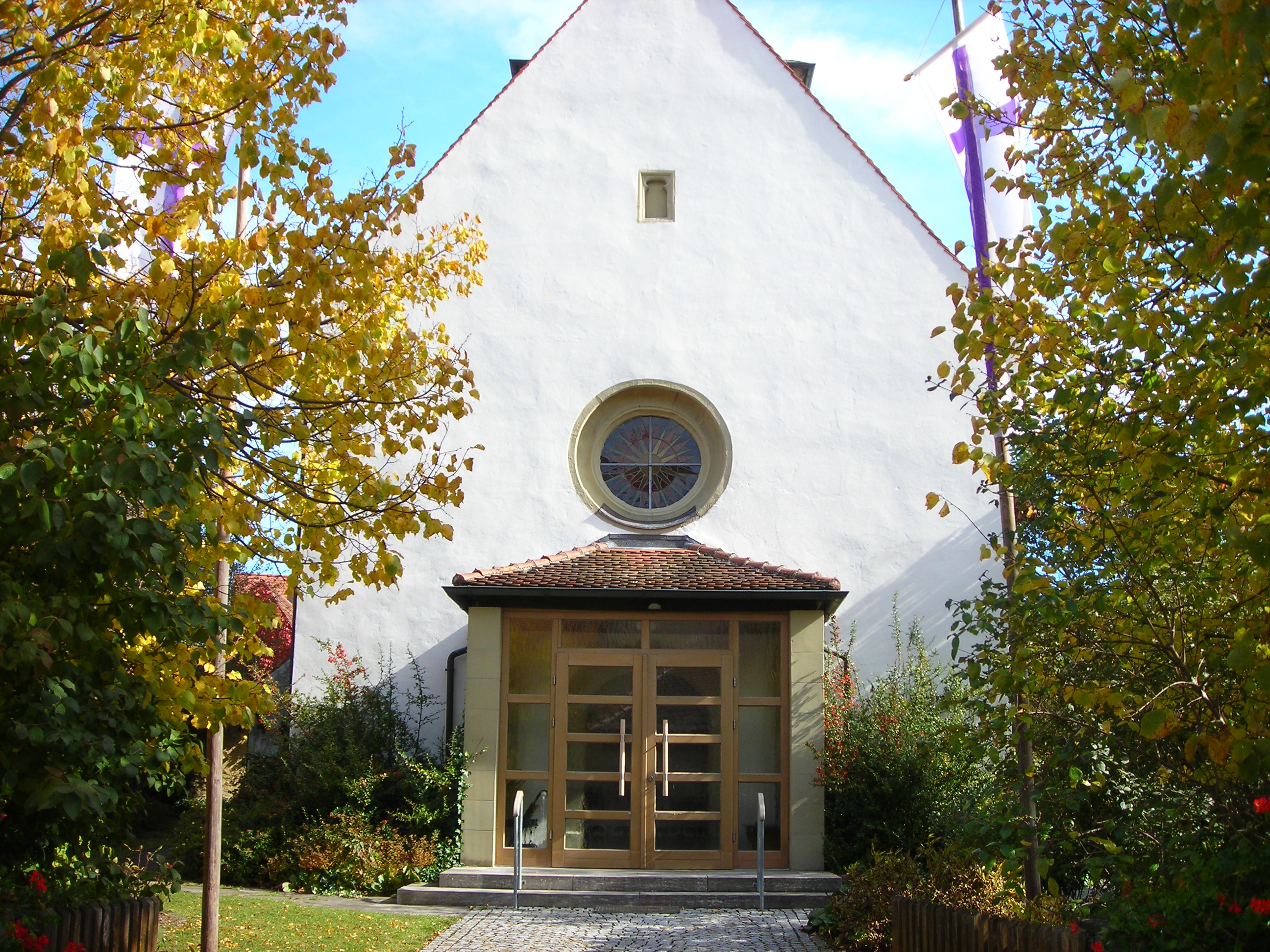 Kirche Eingang